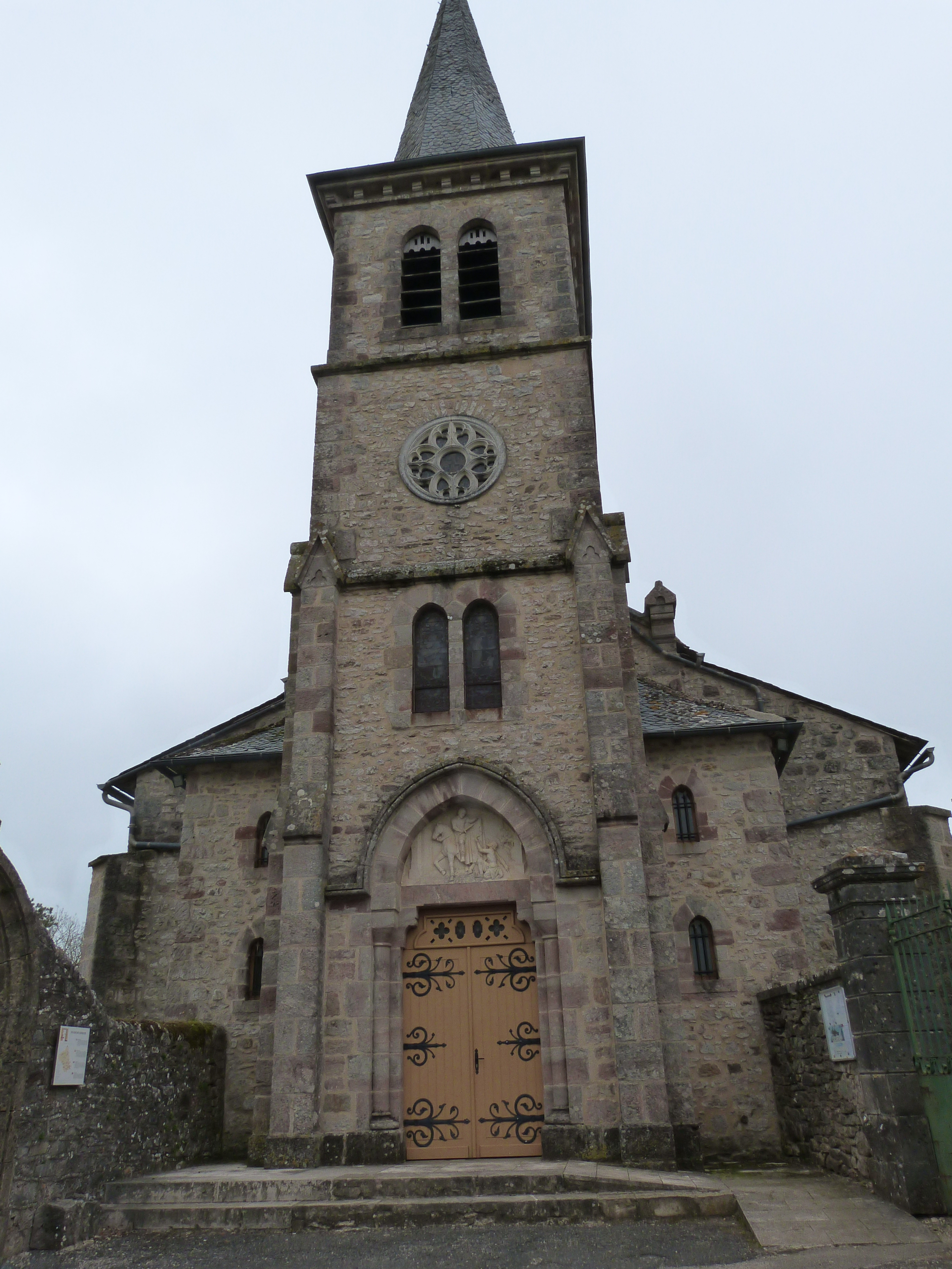 Église Saint-Martin de Limouze de Druelle - Cette église du XV-XVIème s. dépendait de la commanderie Templière d'Espalion.